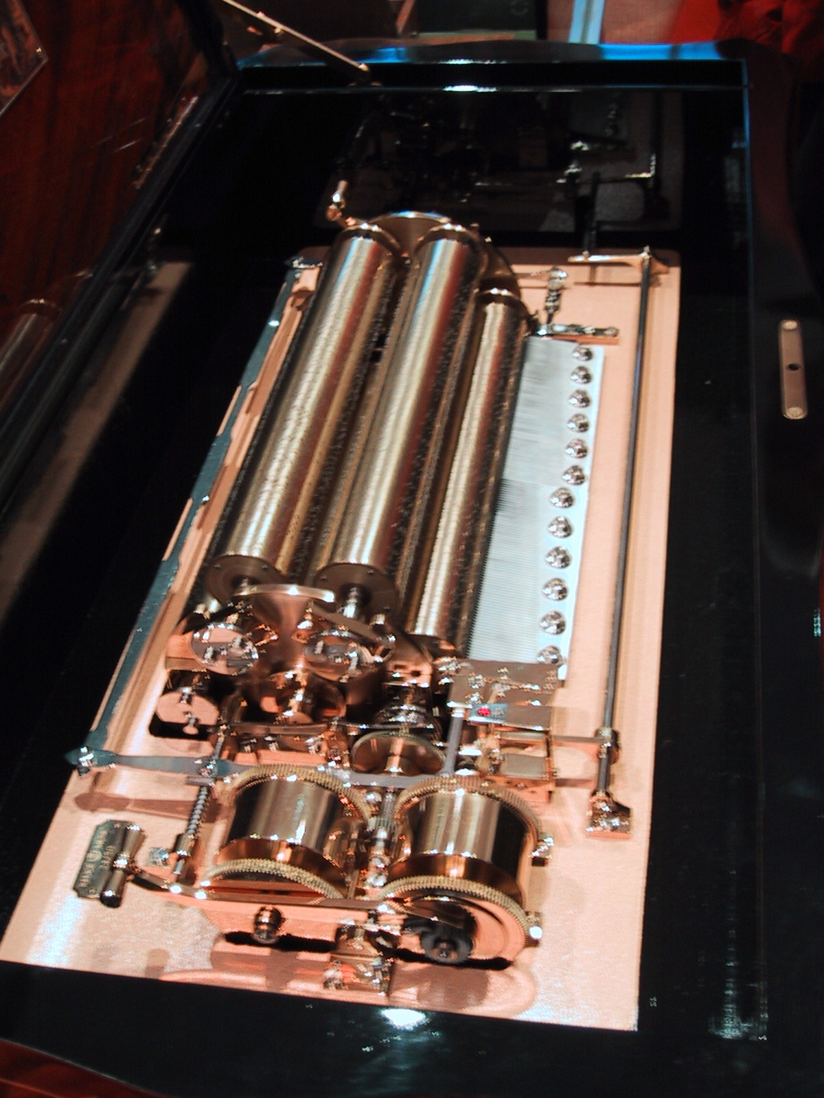 Revolver-Spieldose mit 6 Walzen à 4 Melodien, 2 Tonkämme à 72 Zungen und Doppelfederwerk mit Ratschenaufzug